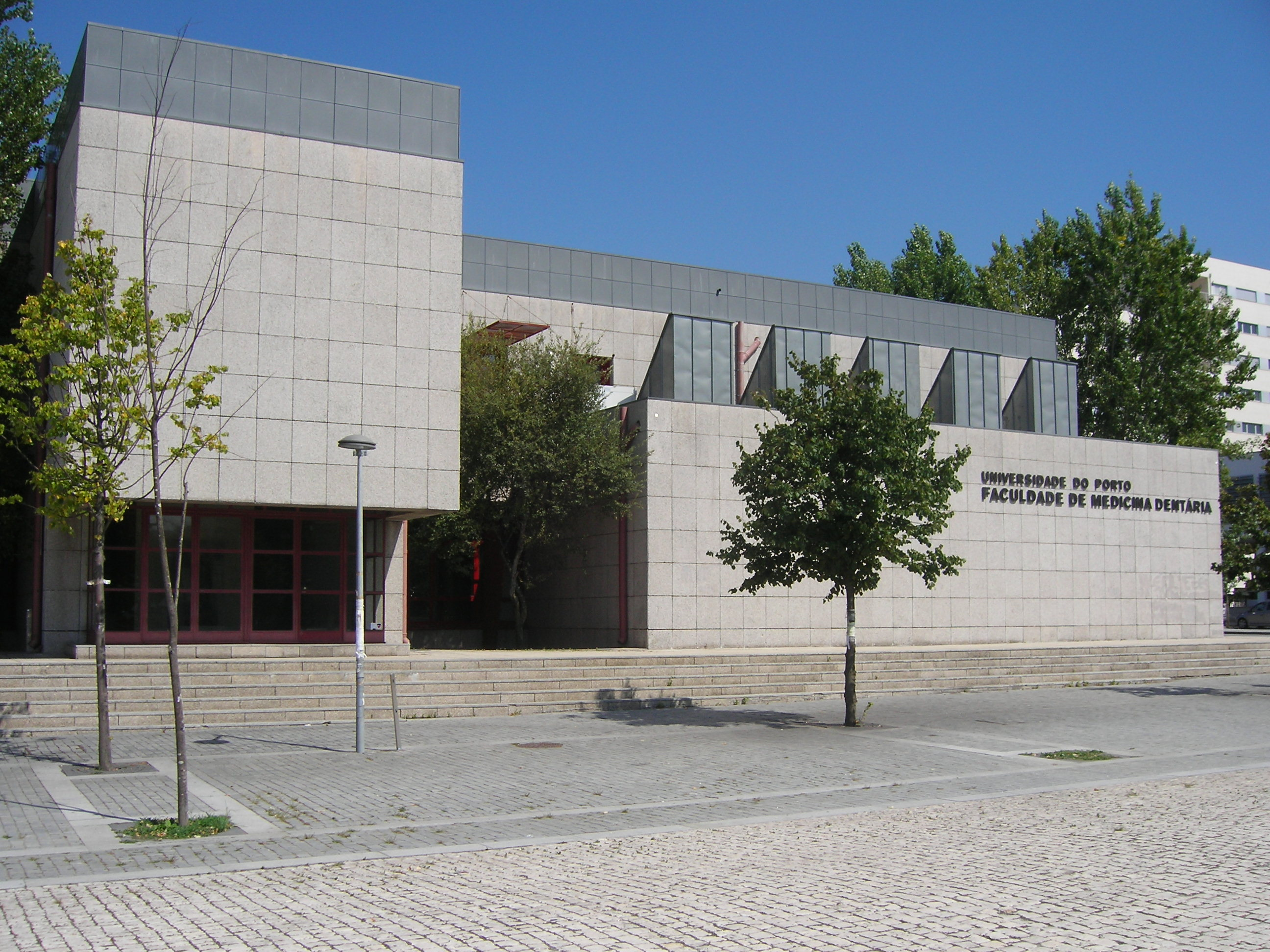 Fachada do edifício da Faculdade de Medicina Dentária da Universidade do Porto